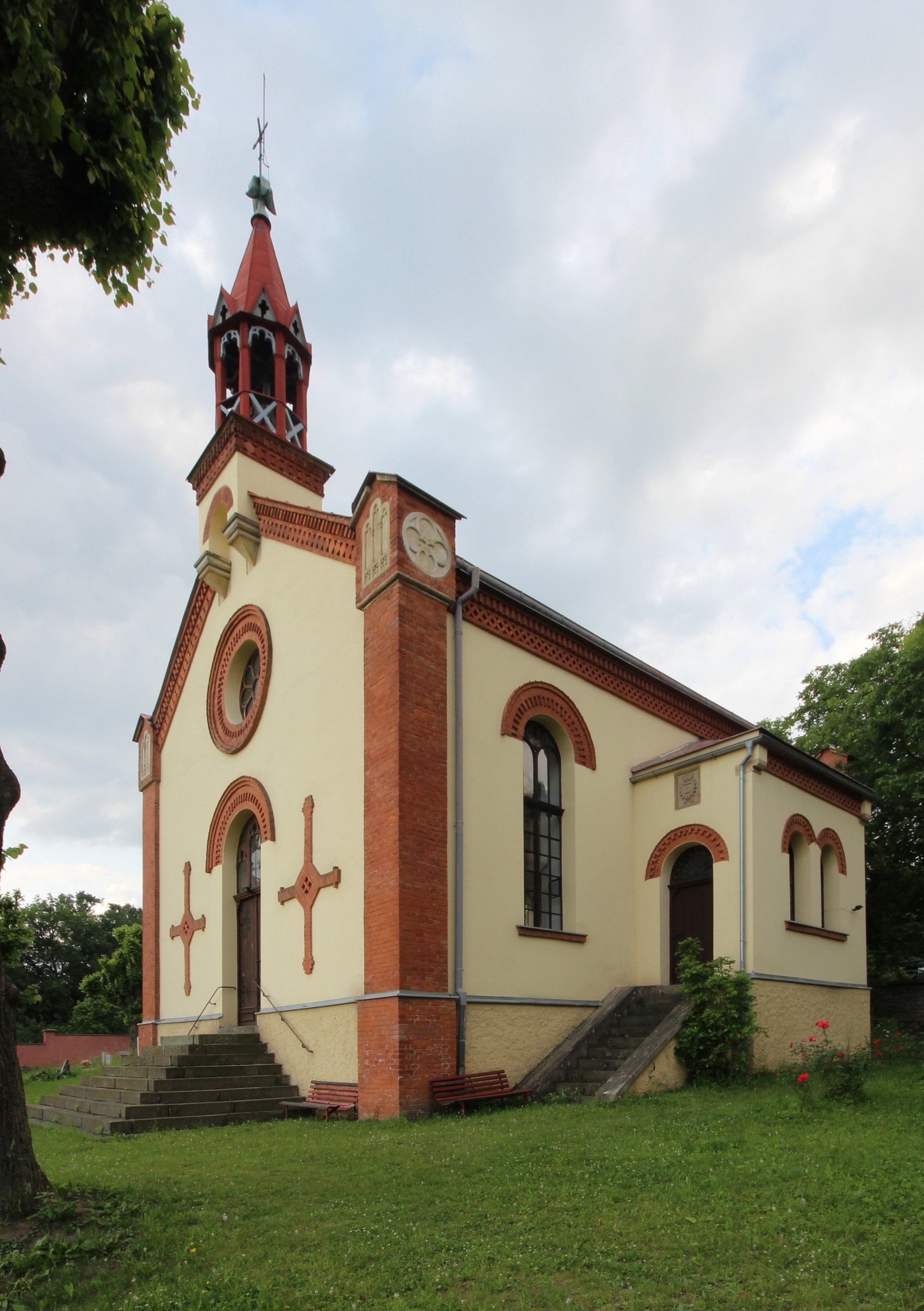 Evangelický kostel v Šonově u Nového města nad Metují. This photograph was taken with a DSLR from WMCZ's Camera grant.